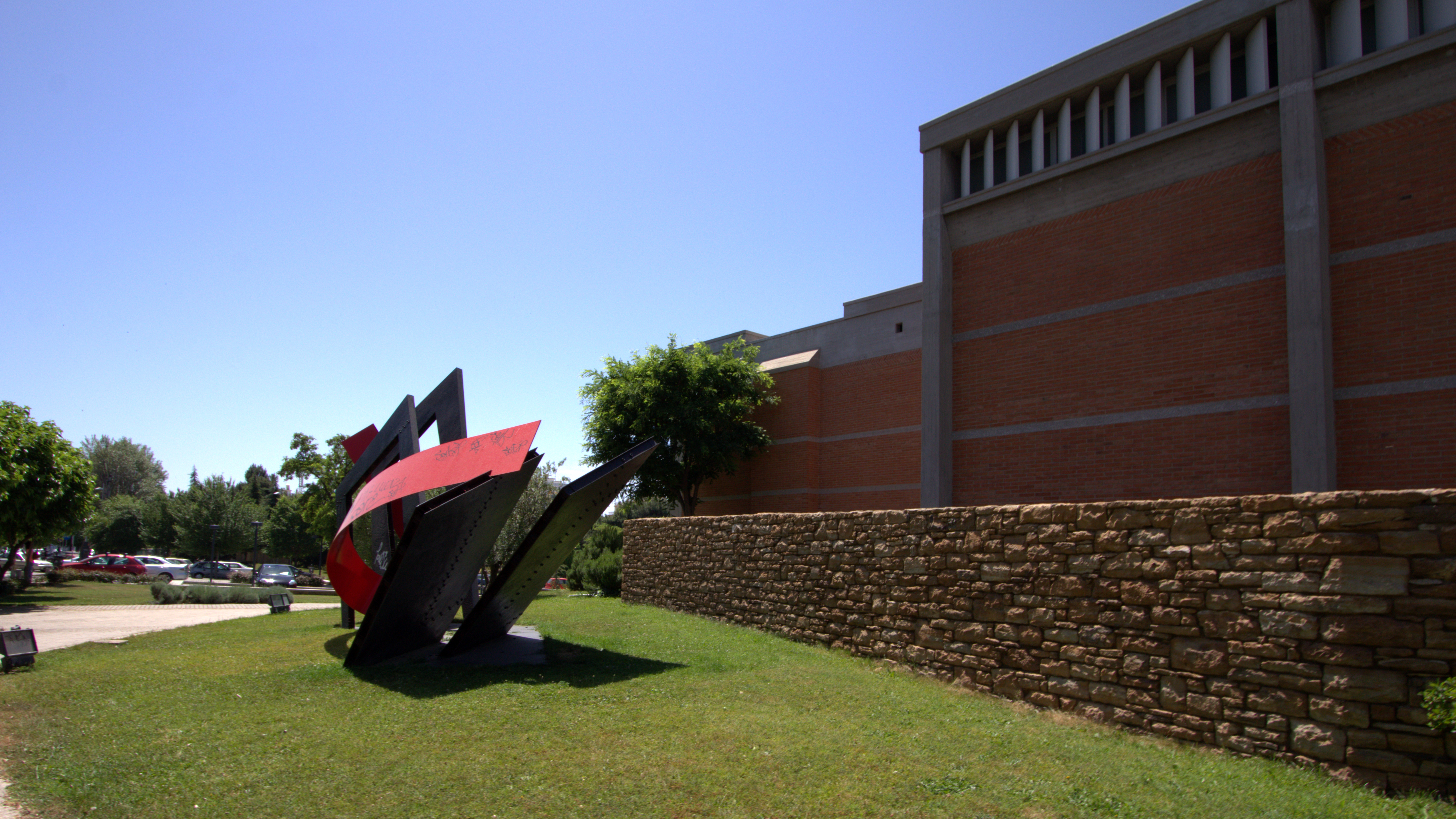 Μουσείο Βυζαντινού Πολιτισμού, Θεσσαλονίκη.